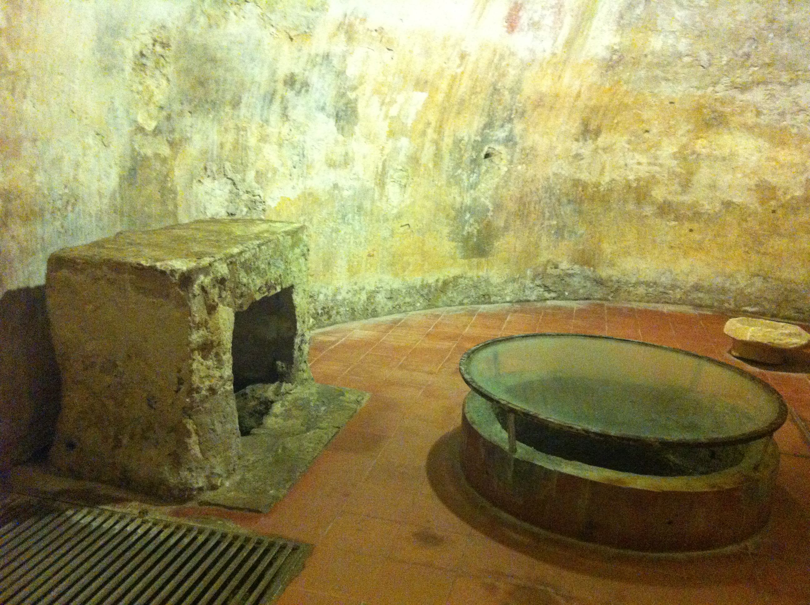 San Salvatore Tharros - MIBAC This is a photo of a monument which is part of cultural heritage of Italy.